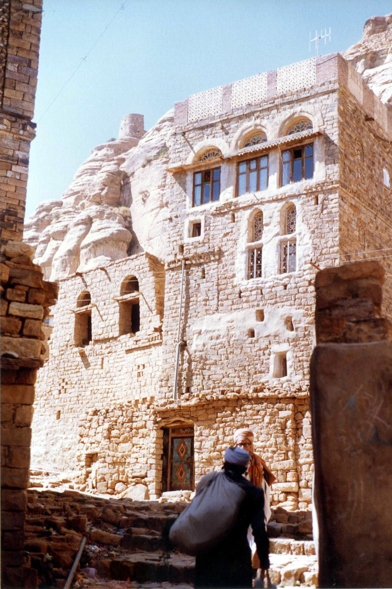 Thula